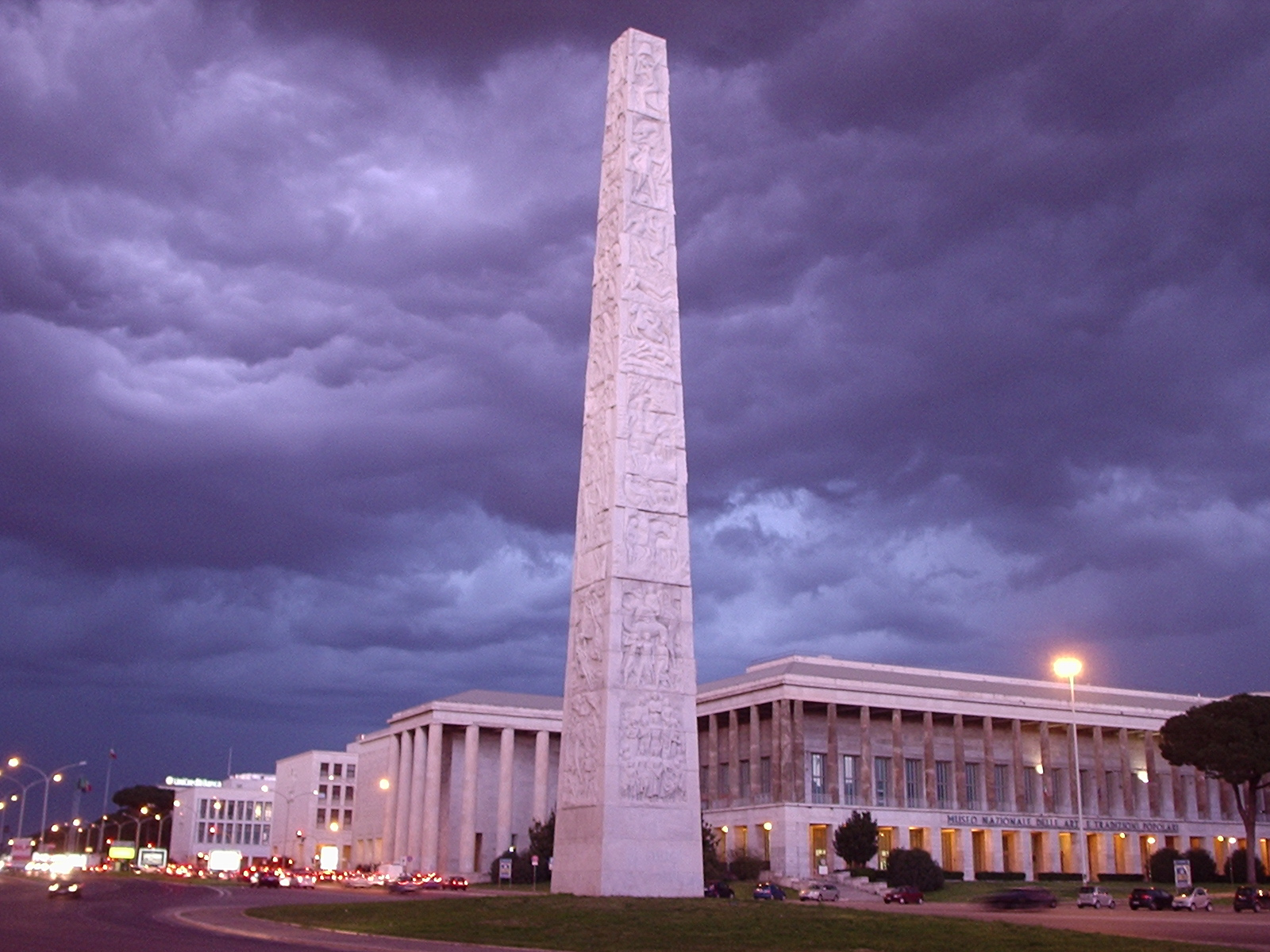 Obelisco in piazza Marconi a Roma, dedicato a Guglielmo Marconi